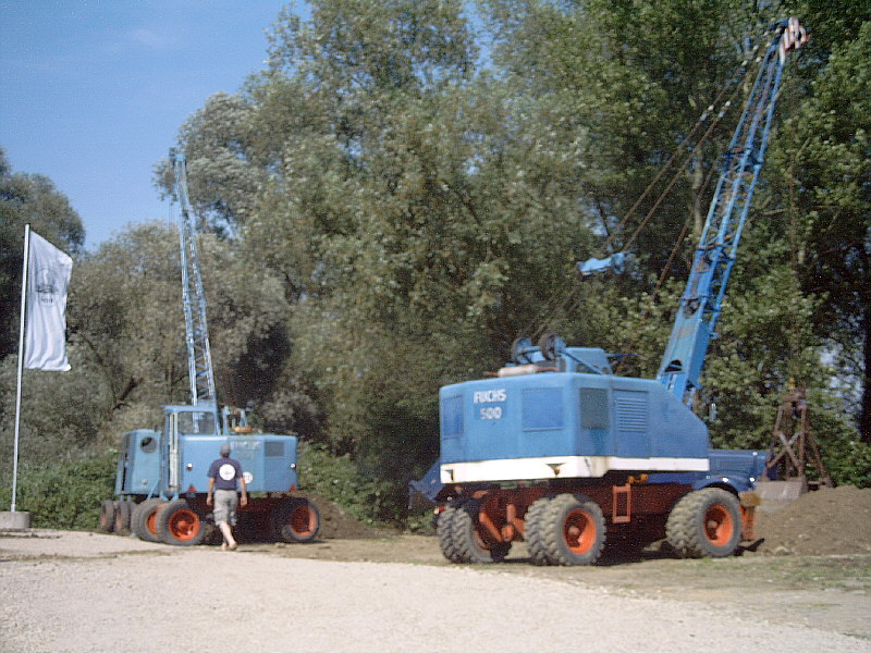 Fuchs Bagger beim 50. Jubiläum des Herstellers in Bad Schönborn